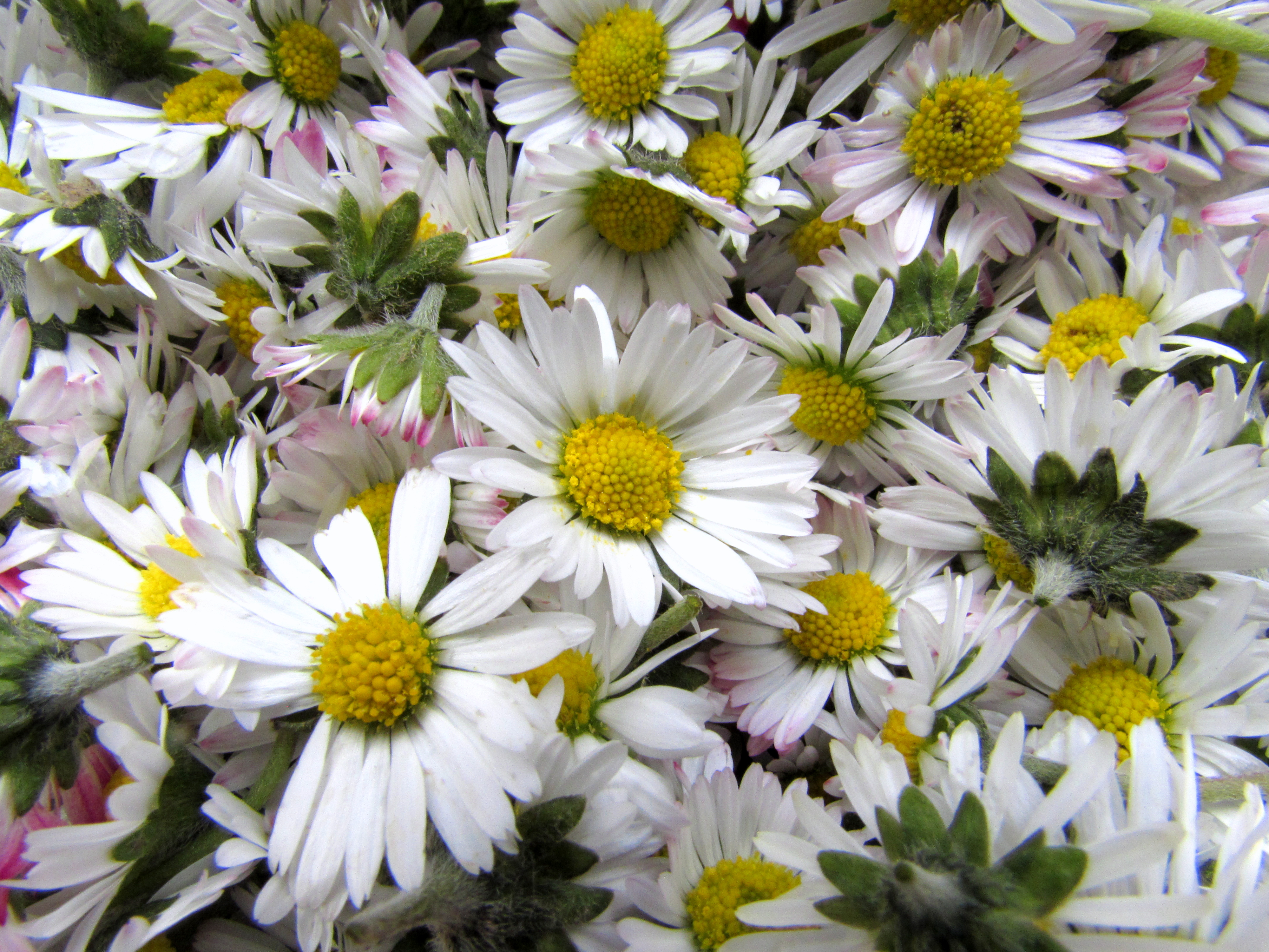 Sedmokráska obyčajná - Bellis perennis